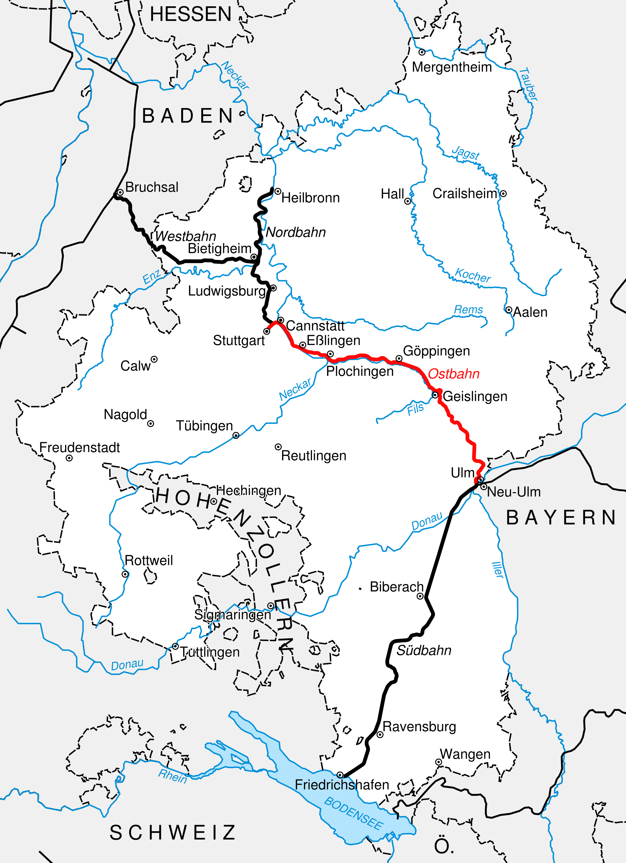 Karte des württembergischen Eisenbahnstreckennetzes, Stand 1854. Rot markiert: Ostbahn (Stuttgart–Ulm).